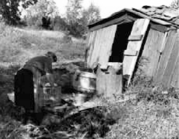 Tvätteri vid Nytorp, Glömsta, Huddinge